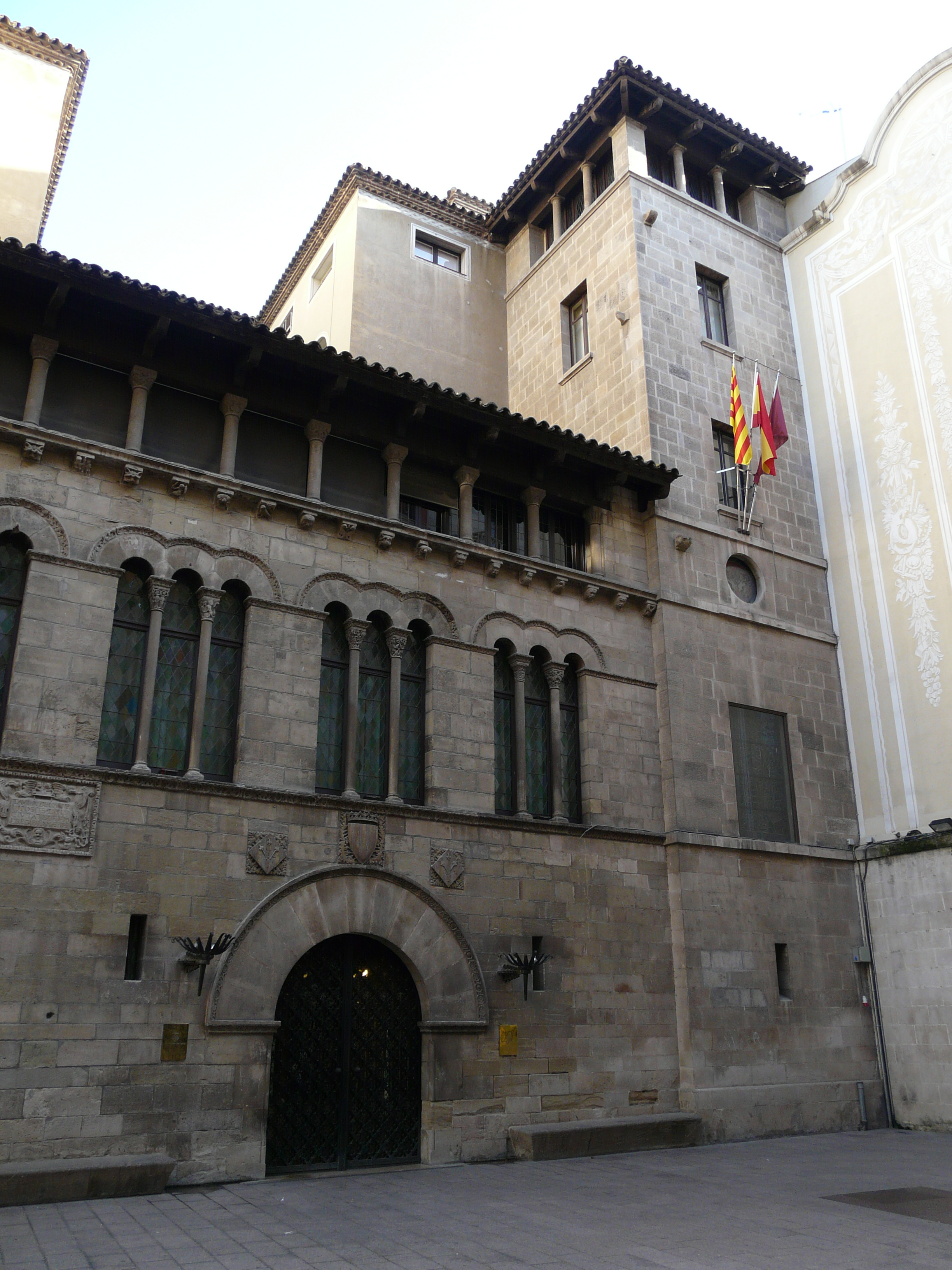 La Paeria (Lleida) Object location41° 36′ 53″ N, 0° 37′ 36.32″ E